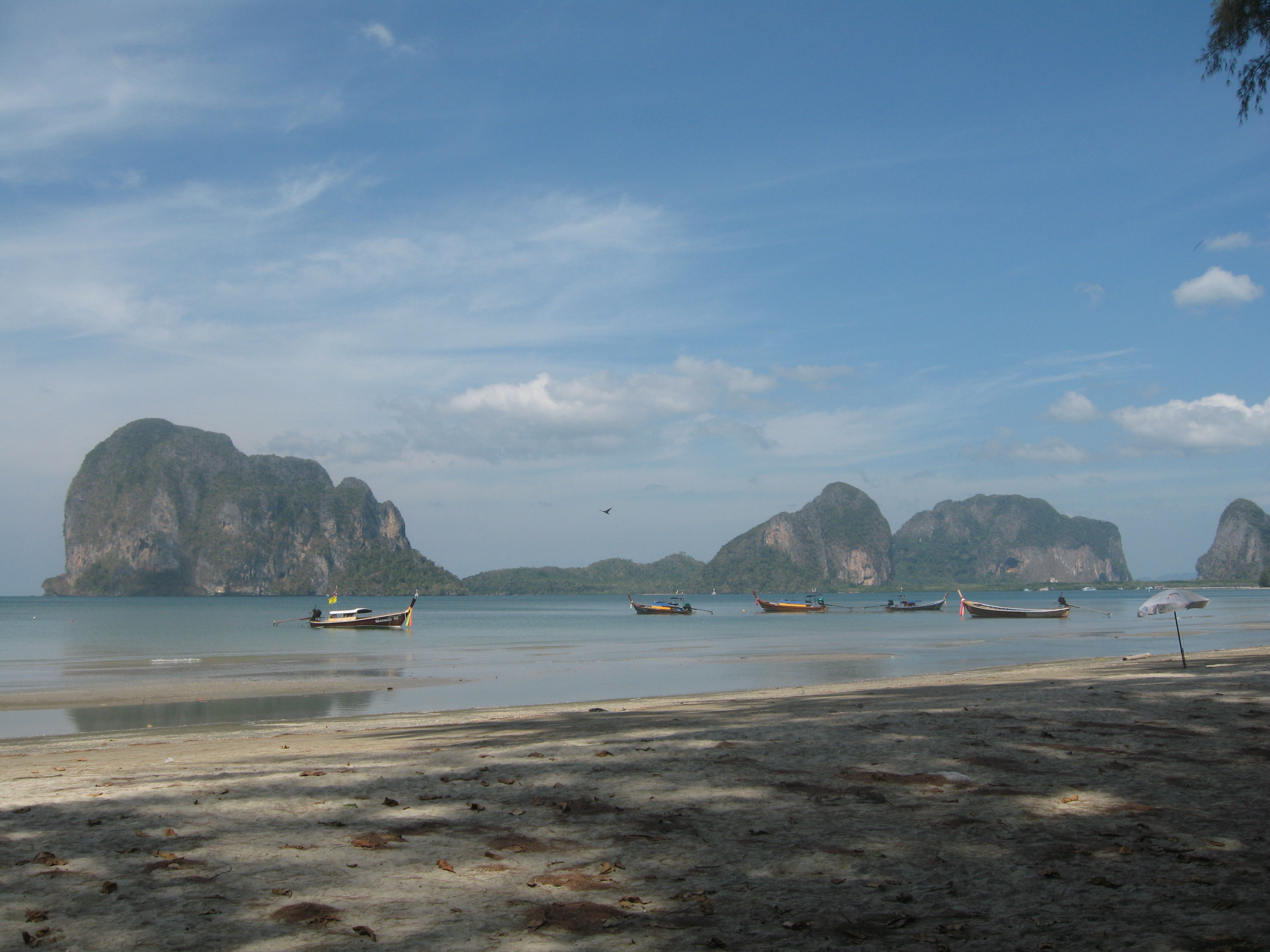 แนวเขาริมทะเลที่ชายหาดปากเมง จ.ตรัง : Pak Meng Beach ,Trang